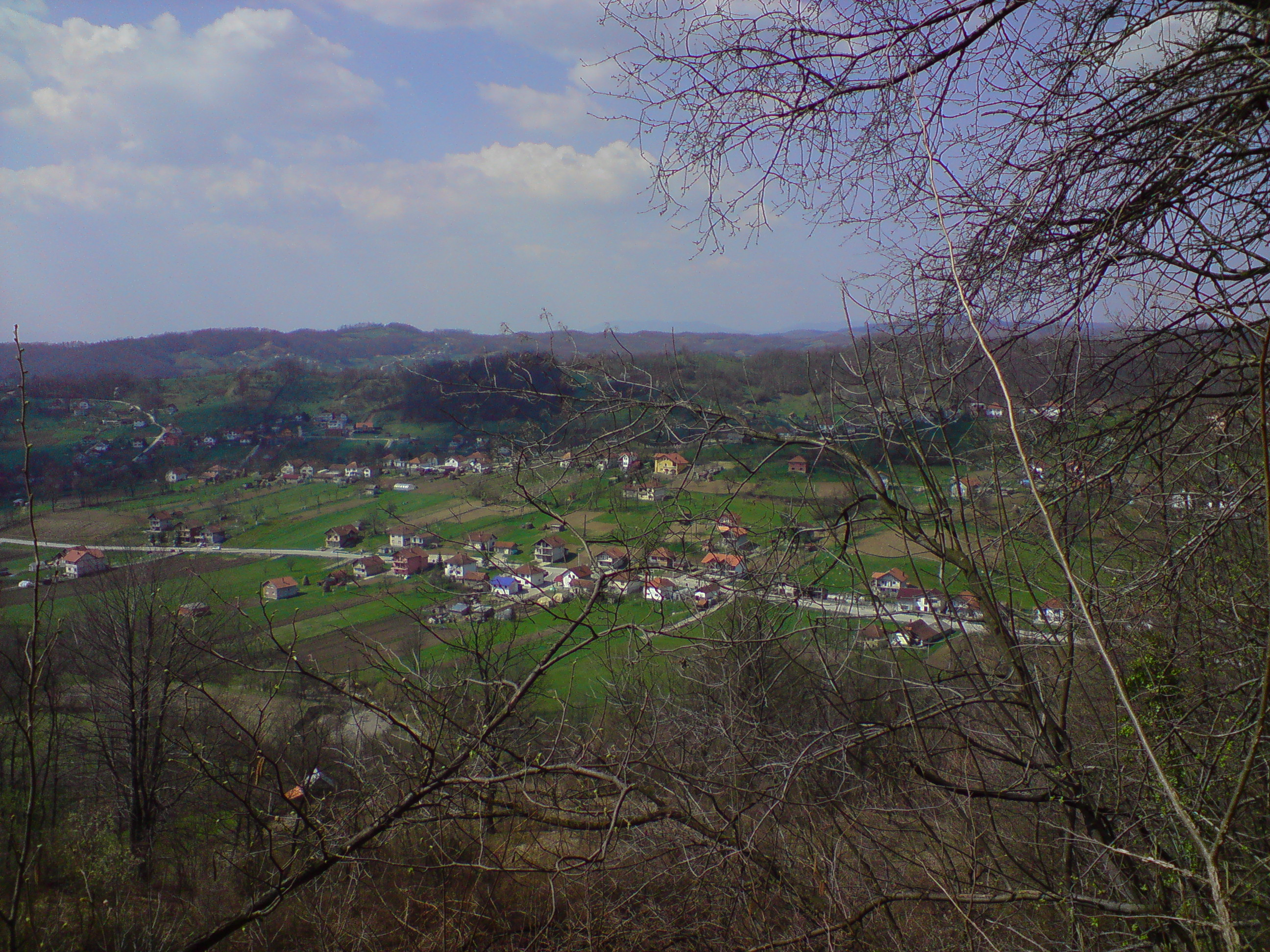 Podorašlje